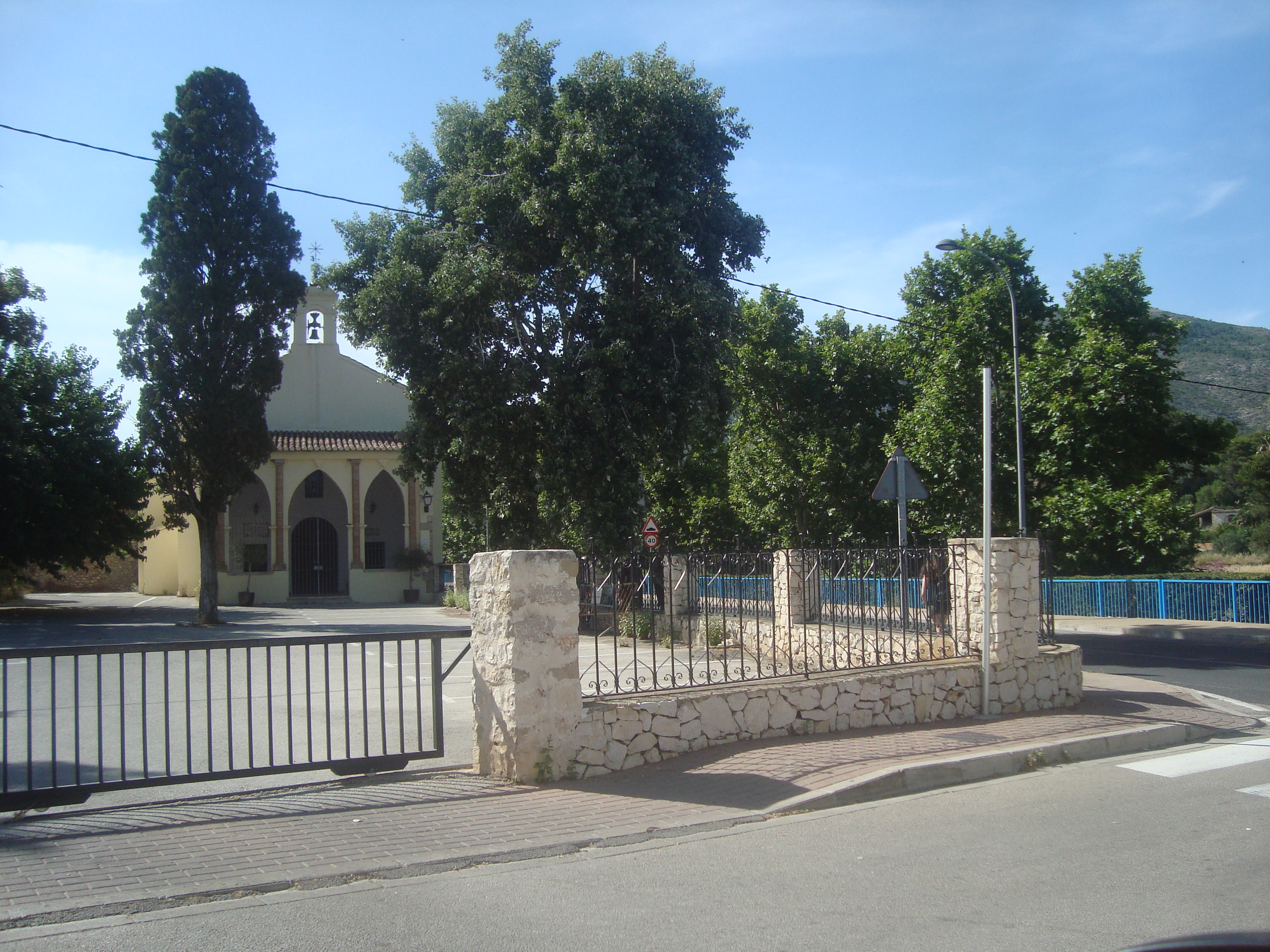 Ermita de Sant Doménec (Xaló) 30.081-010.